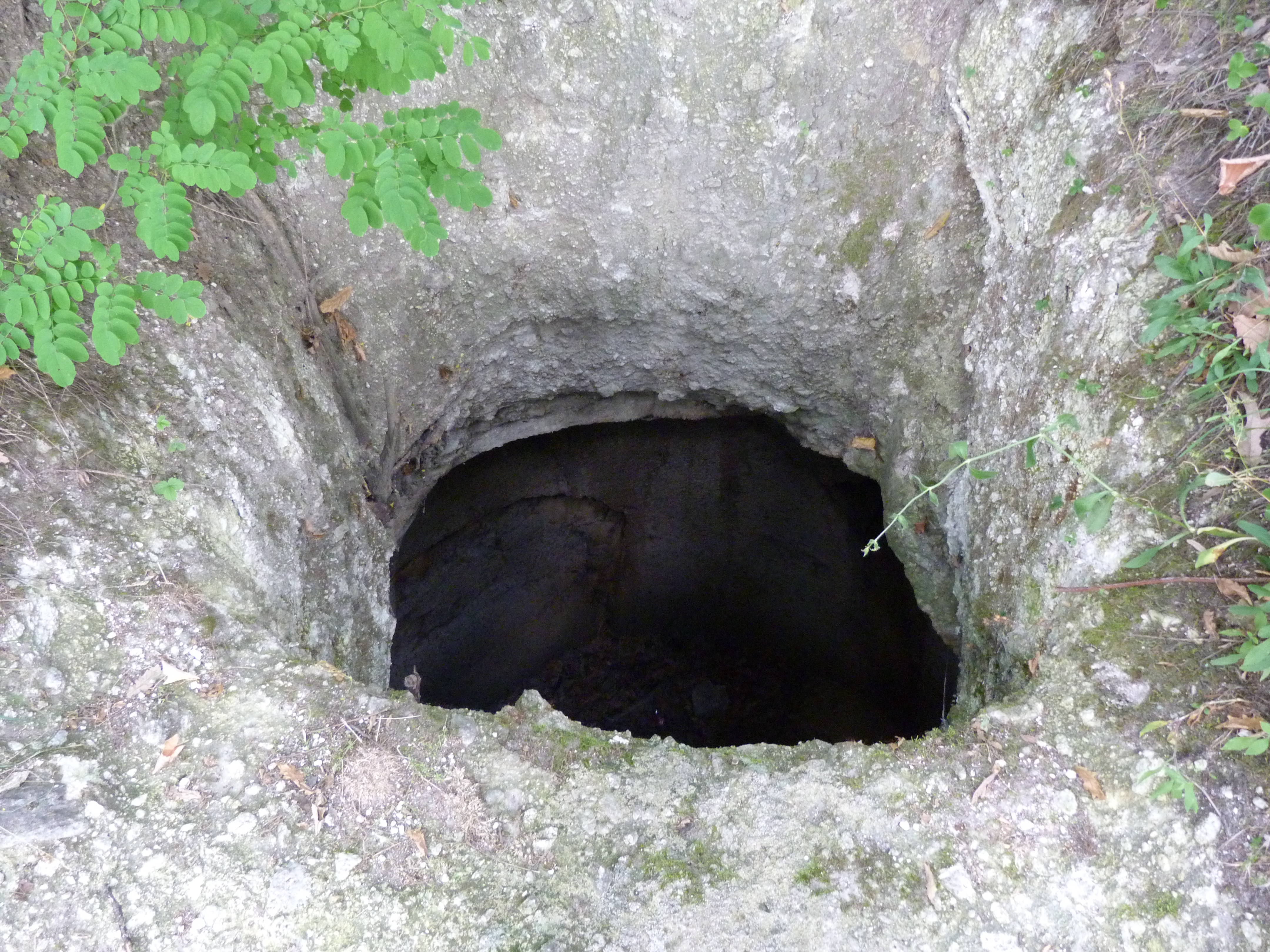 A felvétel 2014. június 20-án, pénteken készült. Cserépváralja, Borsod Abaúj Zemplén Megye. Tardról Cserépváralja felé közeledve, közvetlenül Cserépváralja előtt a Szent István Mezőgazdasági Szövetkezet Ifjúsági táborát jelző táblánál le kell térni. Még az Ifjusági tábor előtt kell jobbra letérni. Gabonatároló verem a Cserépvár előterében vezető út mellett.